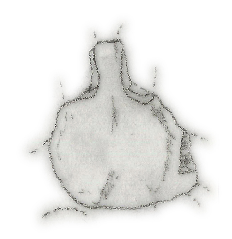 Illustration of a fossil of Yaverlandia